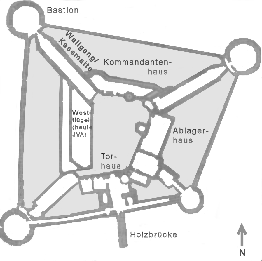 Grundriss Schloss Gifhorn im 18. Jahrhundert Skizze gezeichnet nach historischer Vorlage von Benutzer User:AxelHH, Oktober 2006